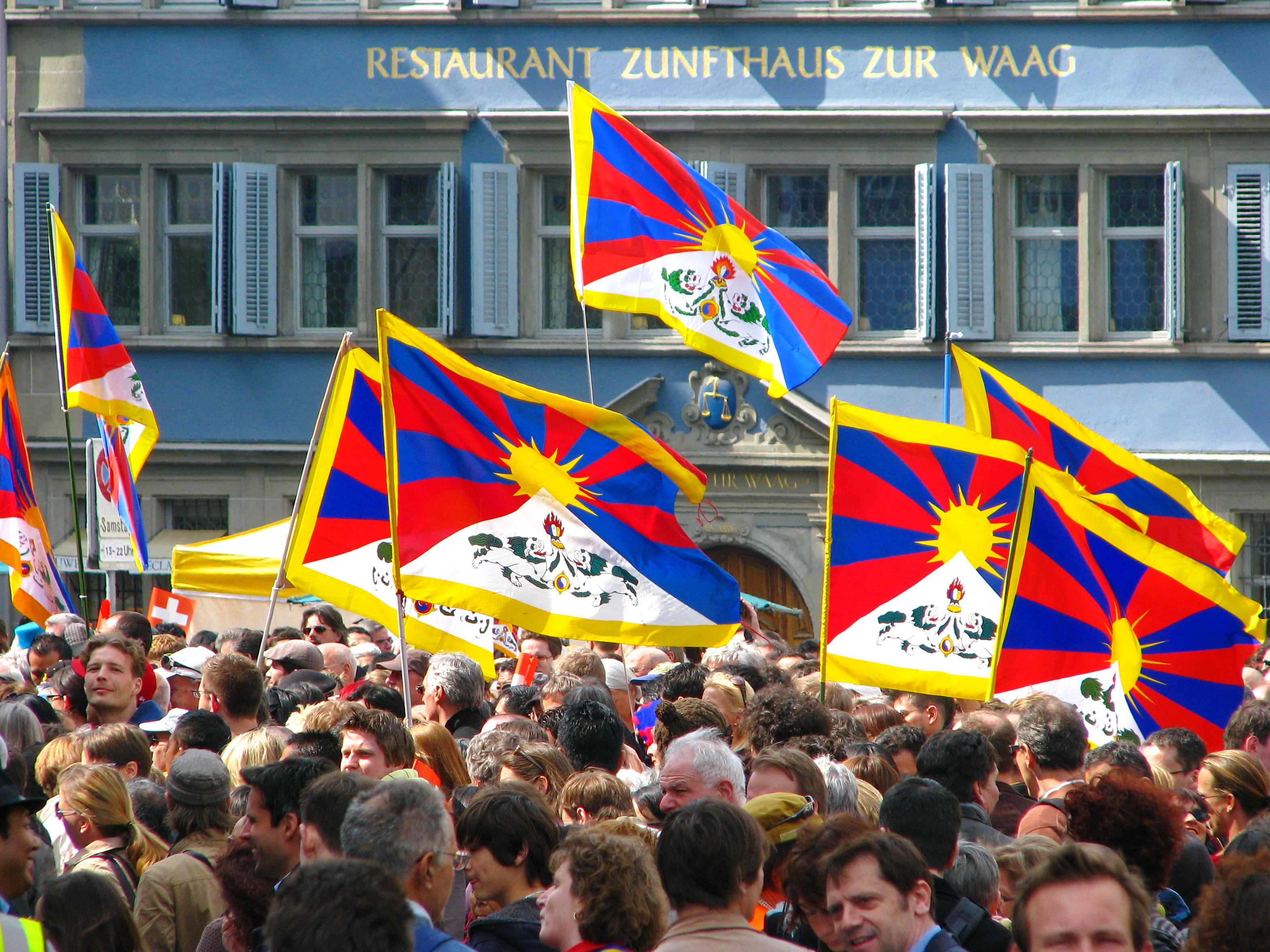 Die Schweiz für Tibet - Tibet für die Welt, Solidaritätskundgebung vom 10. April 2010, veranstaltet von der Gesellschaft Schweizerisch-Tibetische Freundschaft (GSTF) auf dem Münsterhof in Zürich.